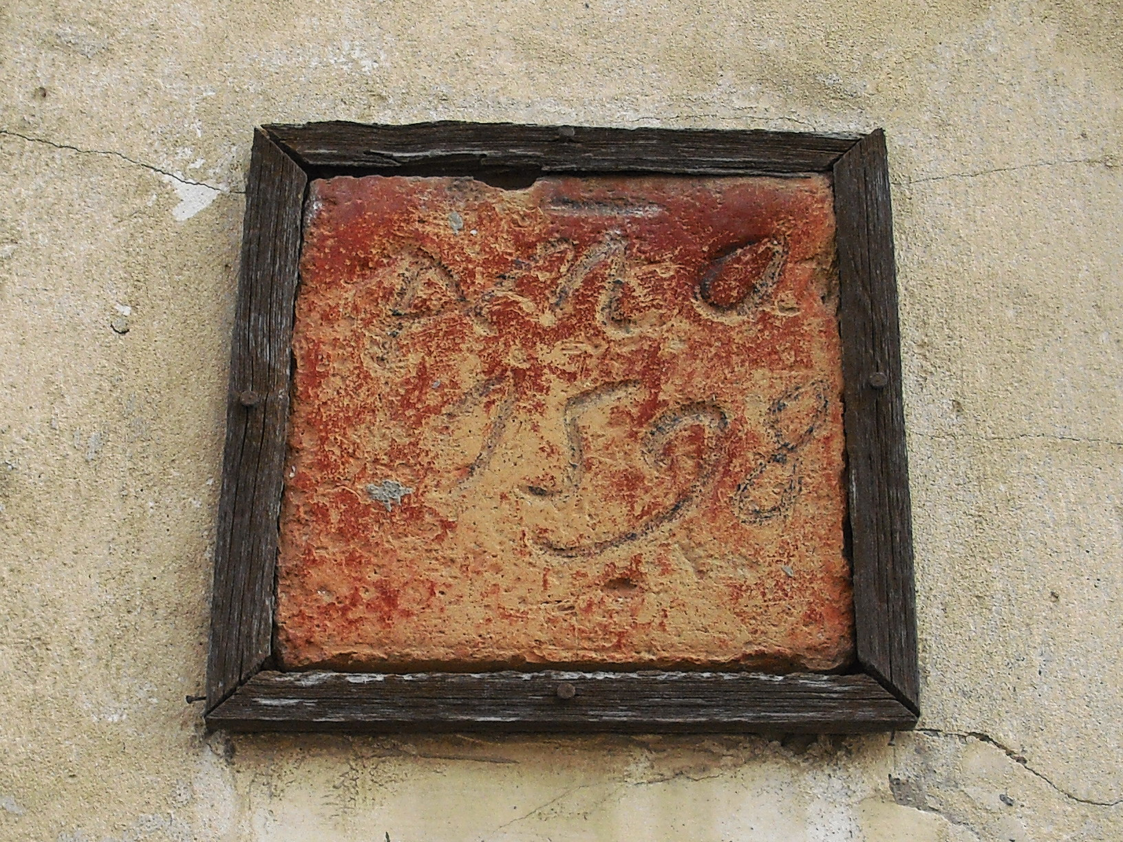 placa